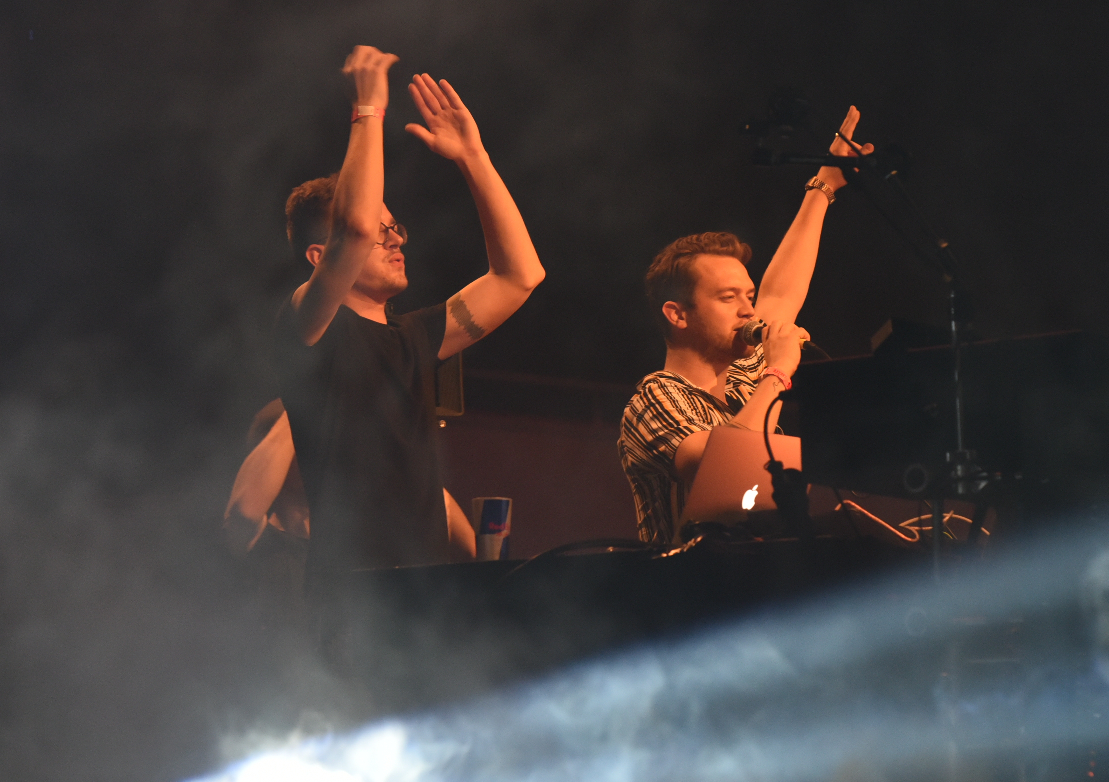 Younotus @ Mayday 2019